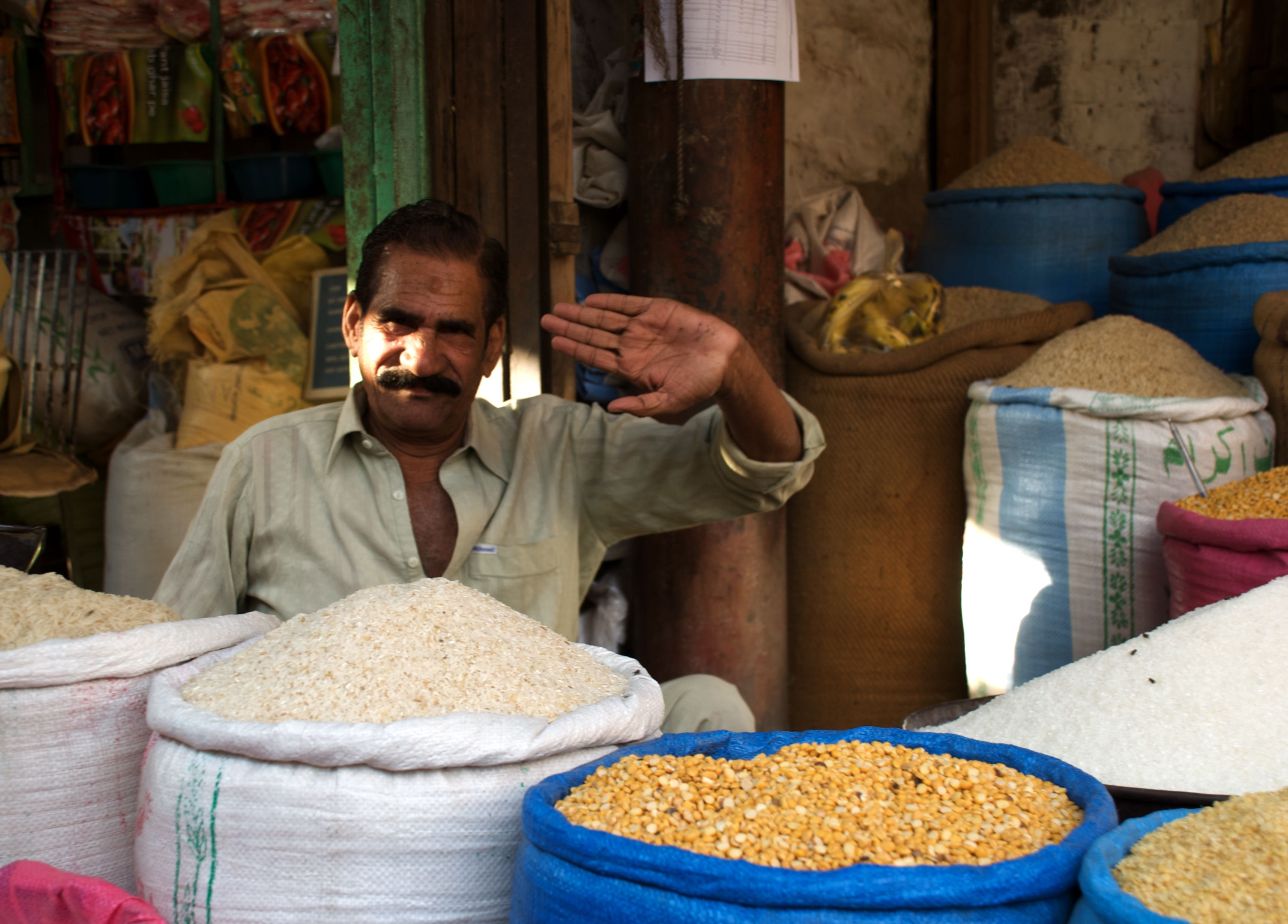 salut in A market in Bahawalpur, Pakistan